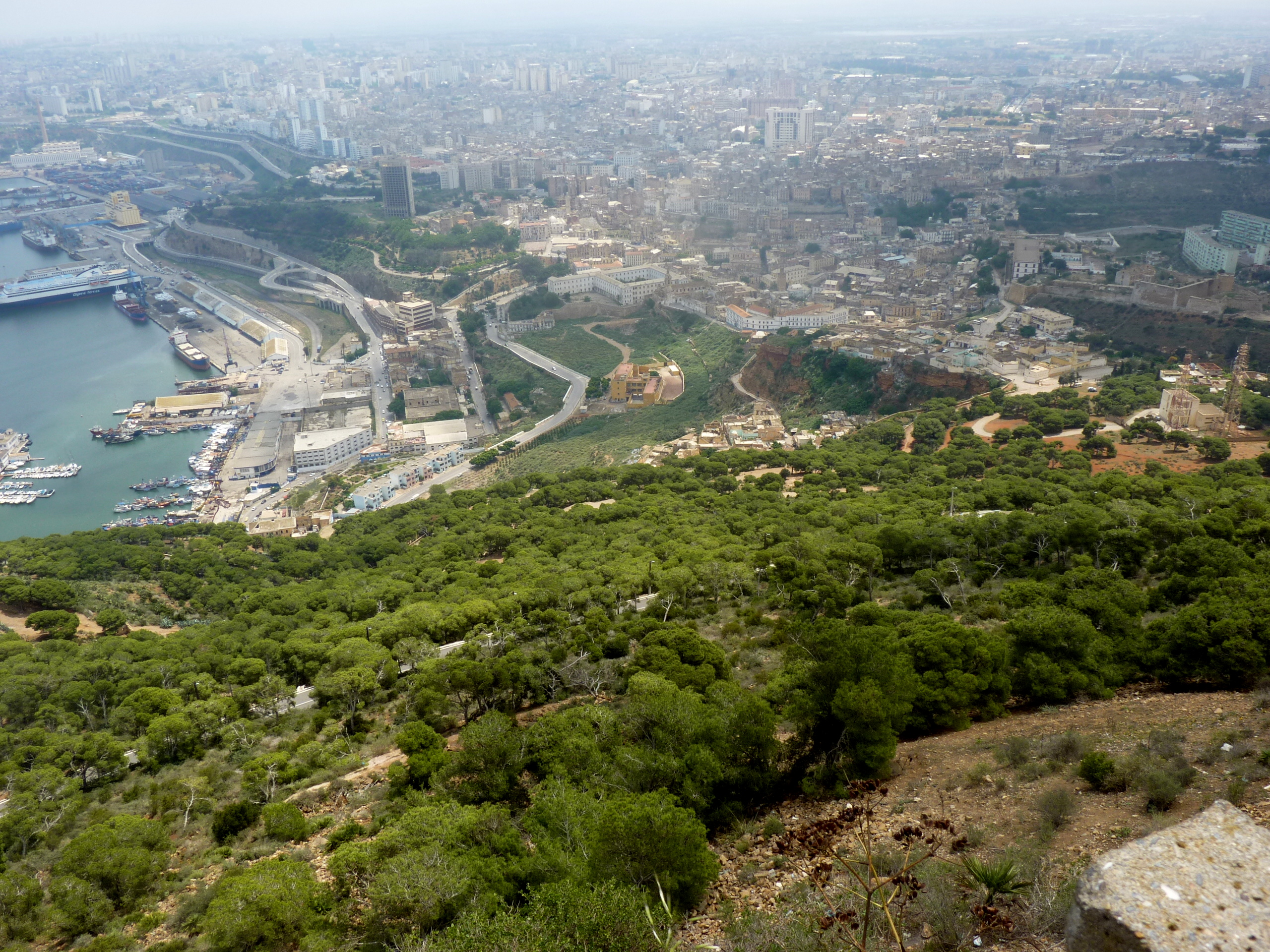 ORan Algérie Mai 2011